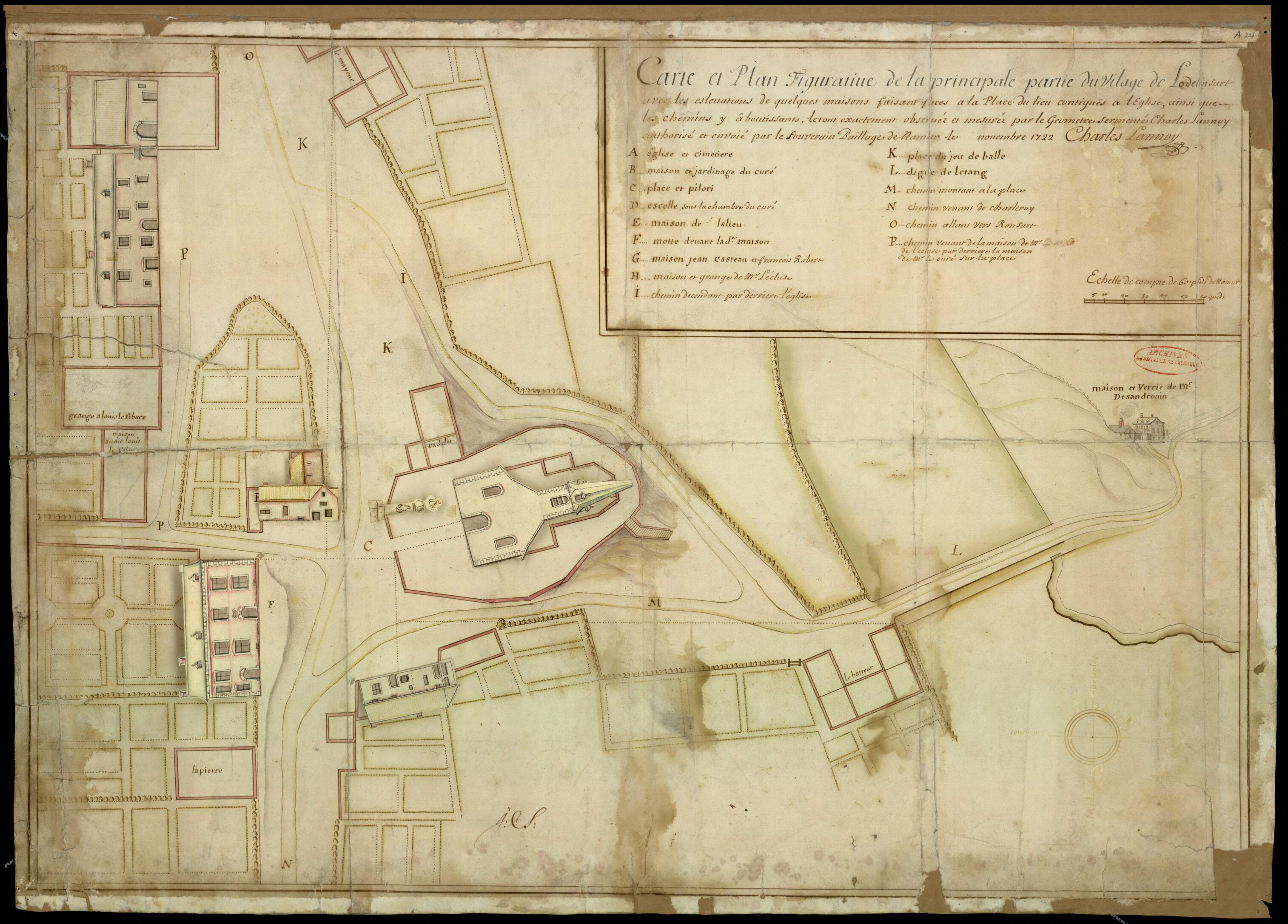 Carte et plan figuratif de la principale partie du village de Lodelinsart, avec les élévations de l'église et de quelques maisons situées sur la place en face de cette dernière, etc., exécutés par l'arpenteur Charles Lannoy, en 1722. Plan manuscrit. Hauteur : 54 cm ; largeur 75 cm. Échelle calculée : 1:655.